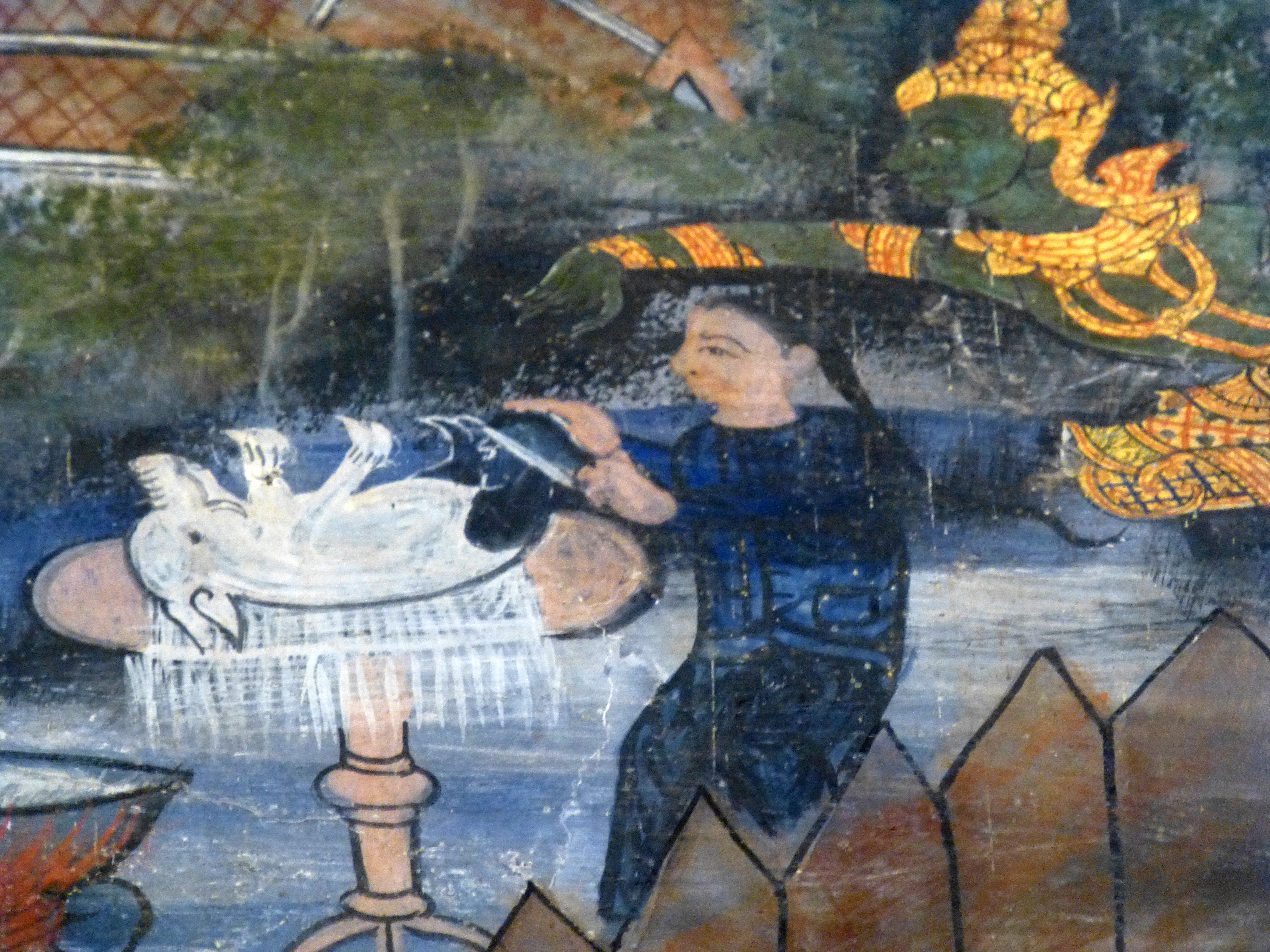 Cunda prepares Pork, Wat Kasatrathiraj, Ayutthaya